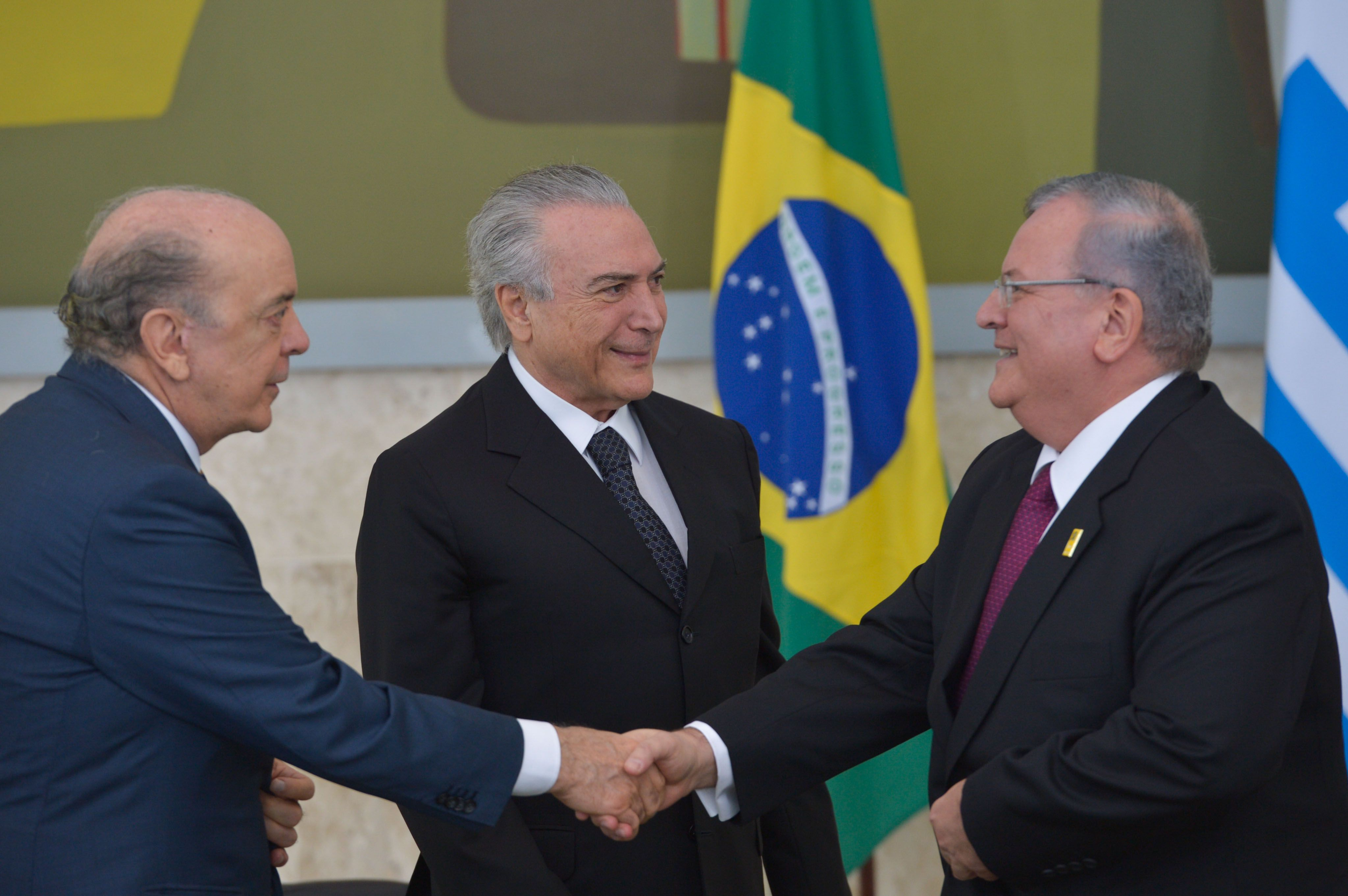 Brasília - O presidente interino Michel Temer recebe em cerimônia no Palácio do Planalto, credencial do embaixador Kyriakos Amiridis, da República Helênica (José Cruz/Agência Brasil).